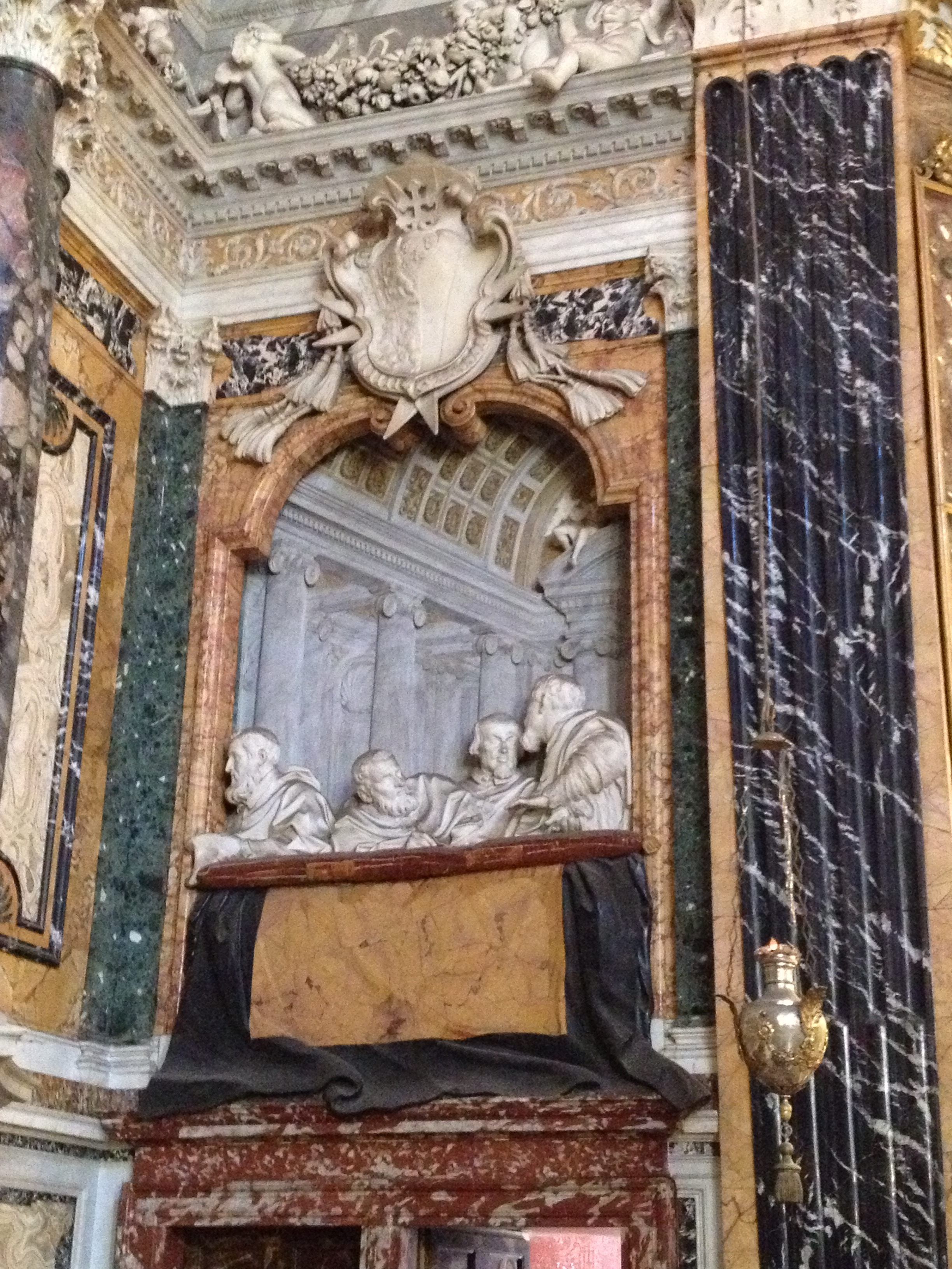 Chiesa di Santa Maria della Vittoria a Roma - Cappella Corner - membri della famiglia